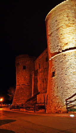 Castillo de Monteodorisio